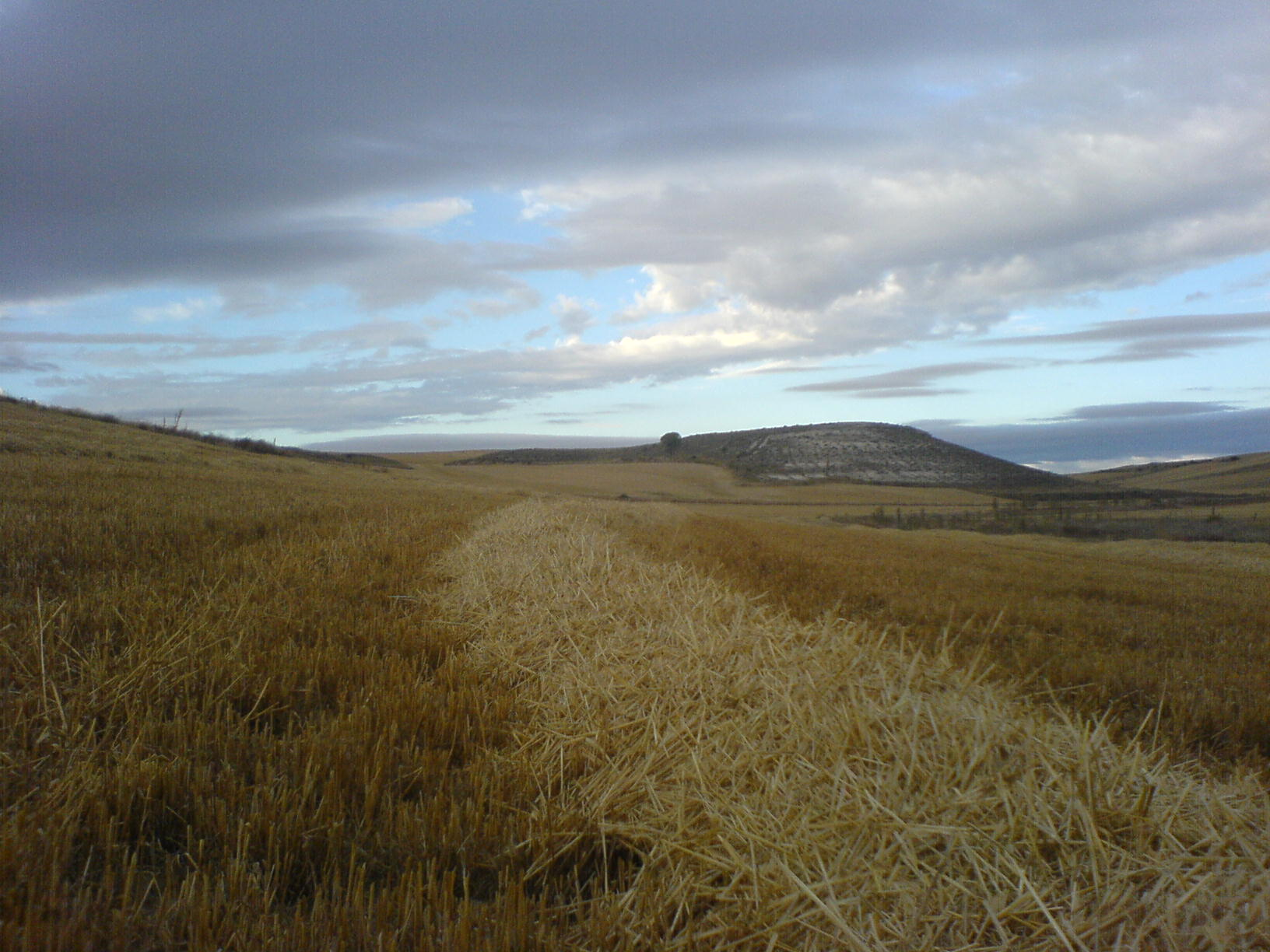 Rastrojo